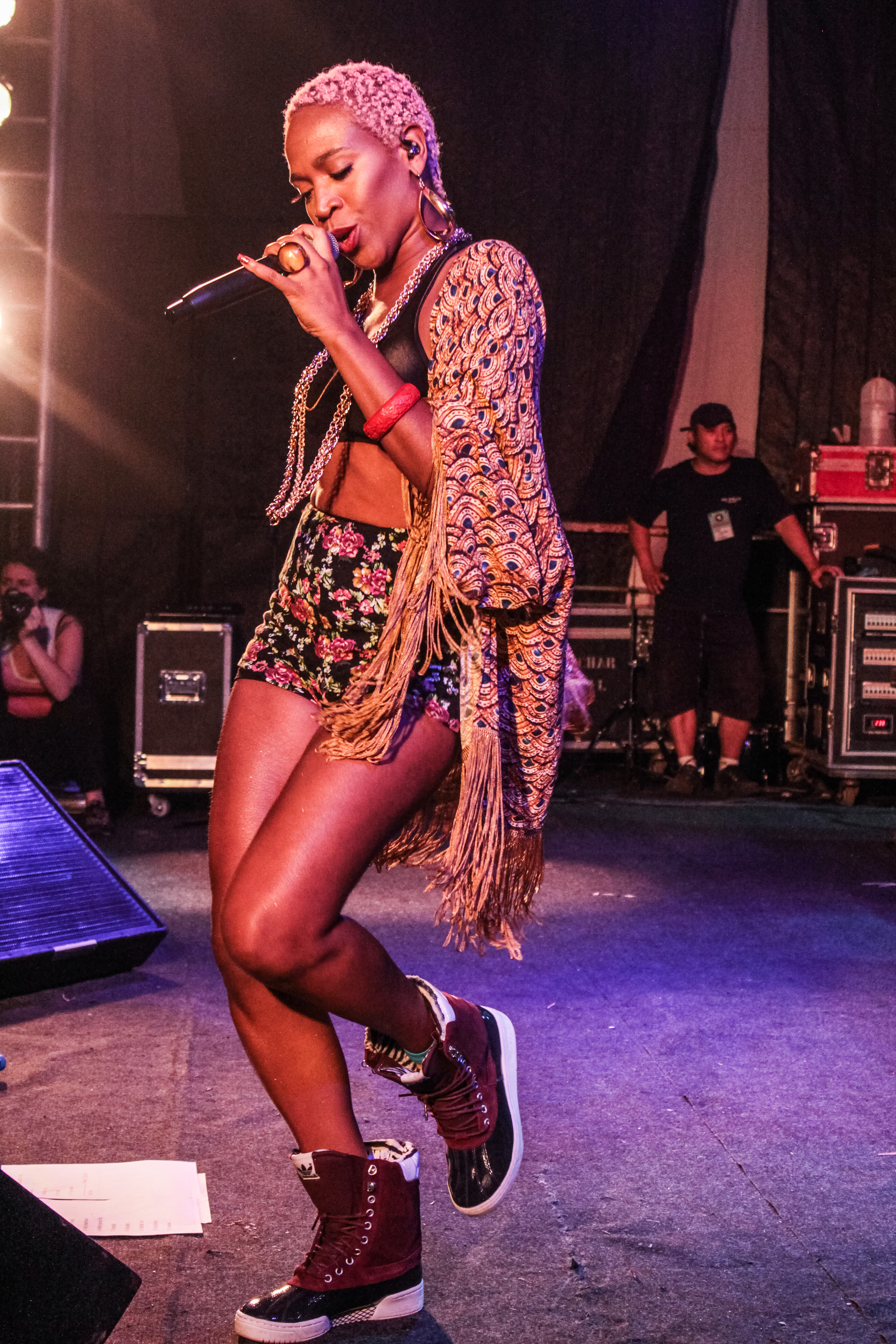 Parque do Bicão. 13/09/2014 Palco CONTATO